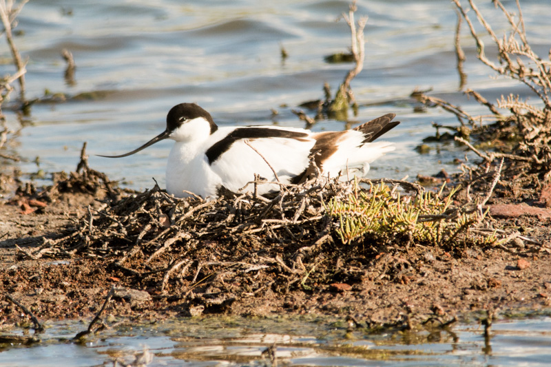 kluut-2.jpg